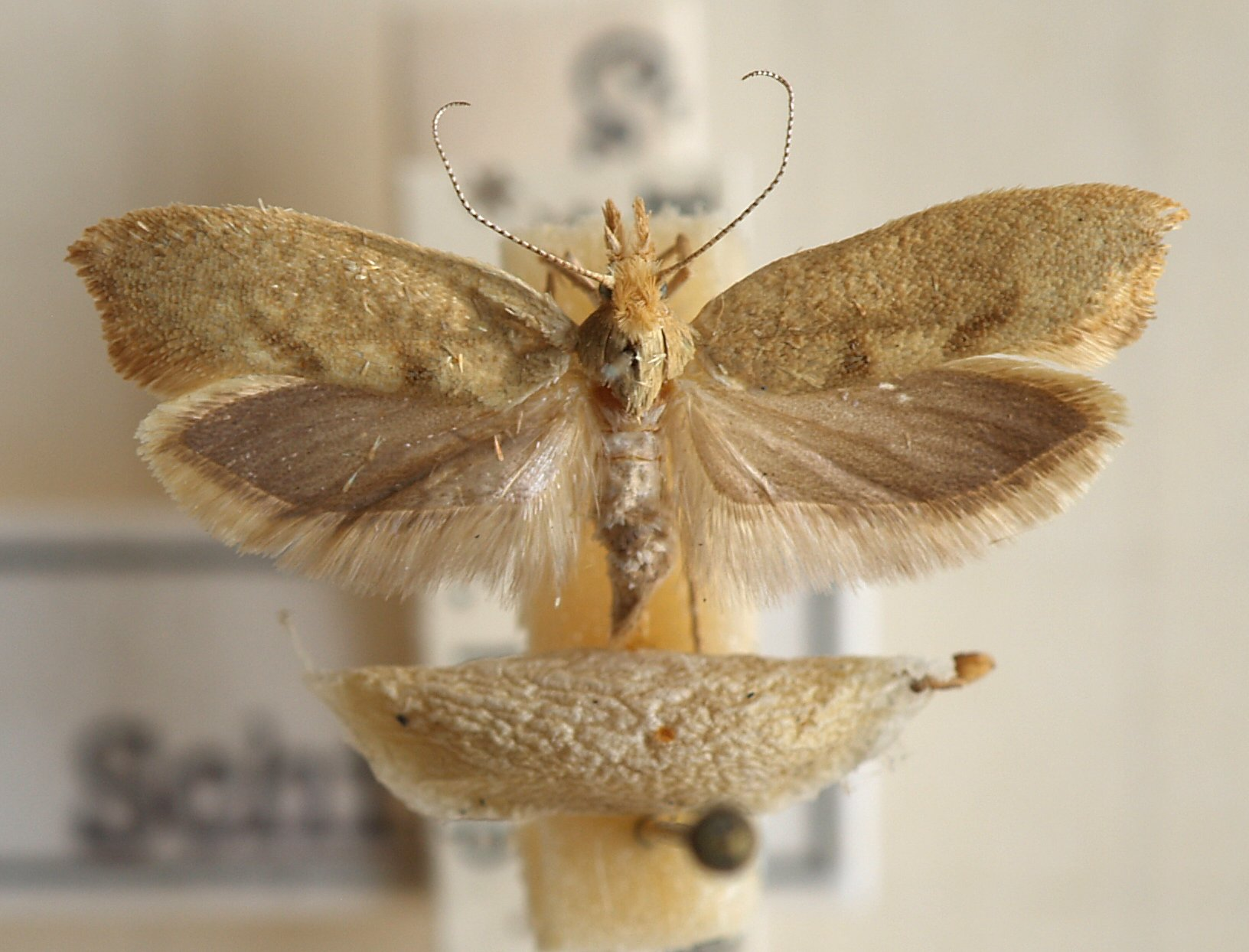 Ypsolopha alpellus